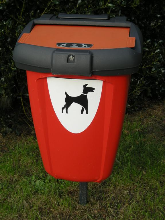 Hondenpoepcontainer (dog)